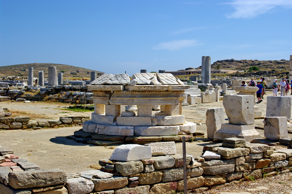 Agora Compitaliasten, Hermes-Heiligtum, Delos